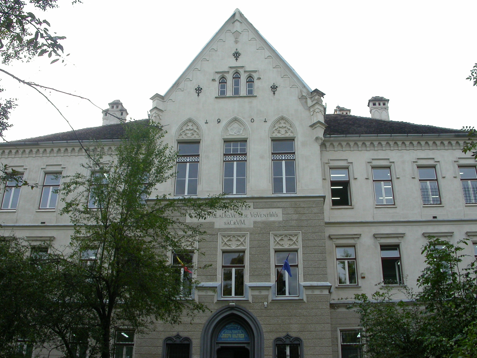 Liceul "J. Haltrich" sec. XVI, 1901